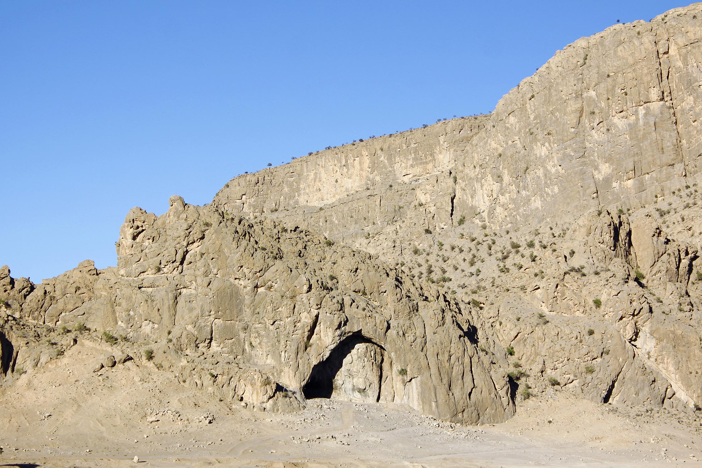 اشکفت سید خاتون